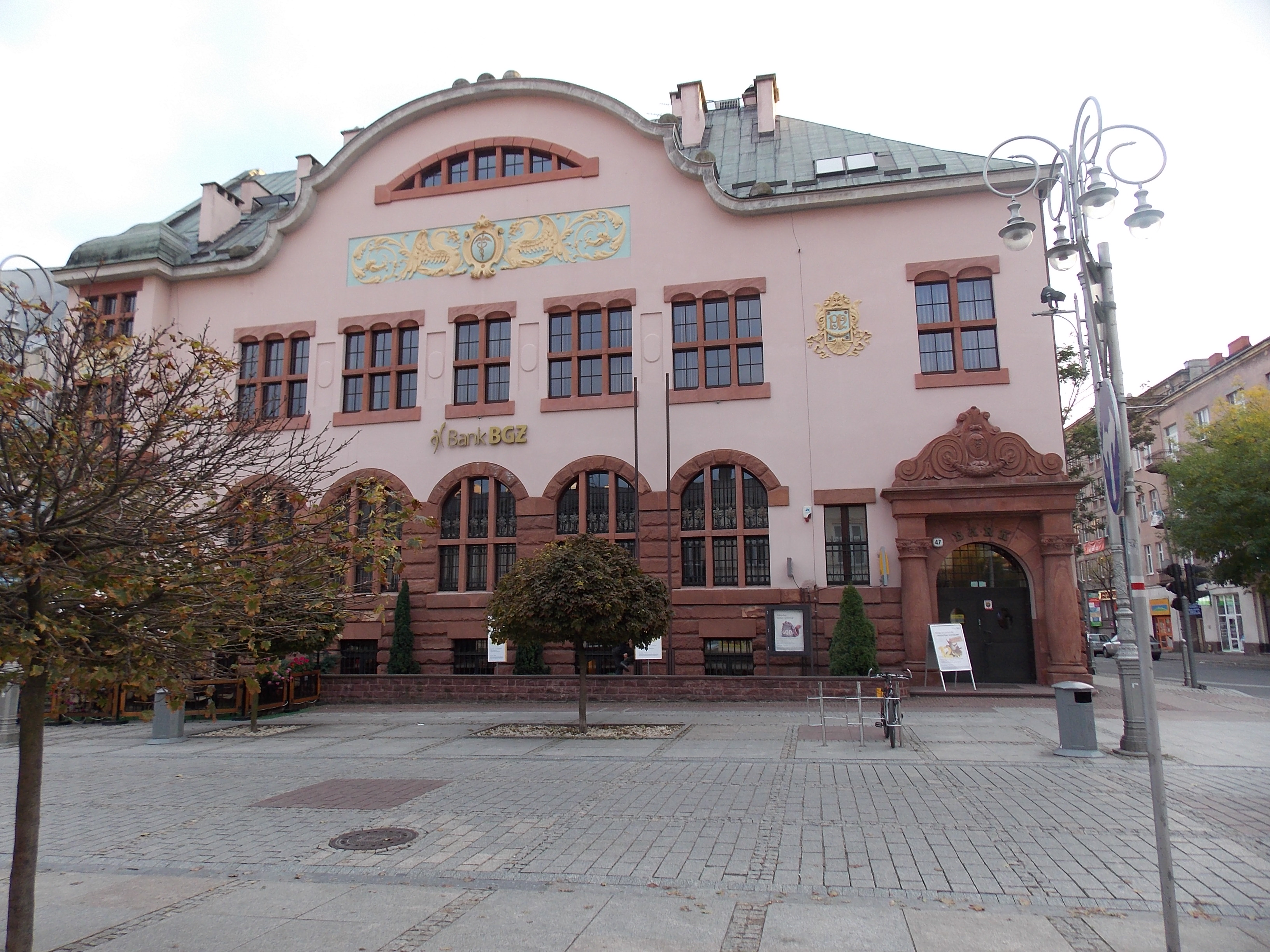 Kielce, bank, 1912 r.